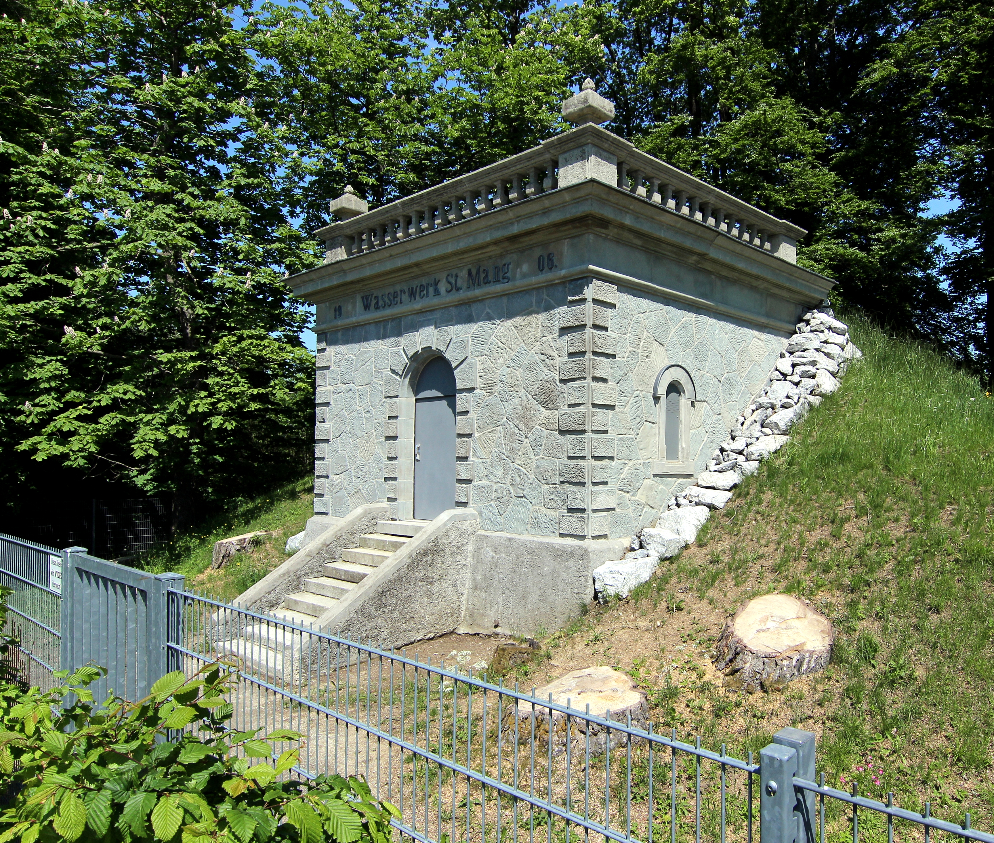 Wasserhochbehälter auf dem Lenzfrieder Höhenrücken